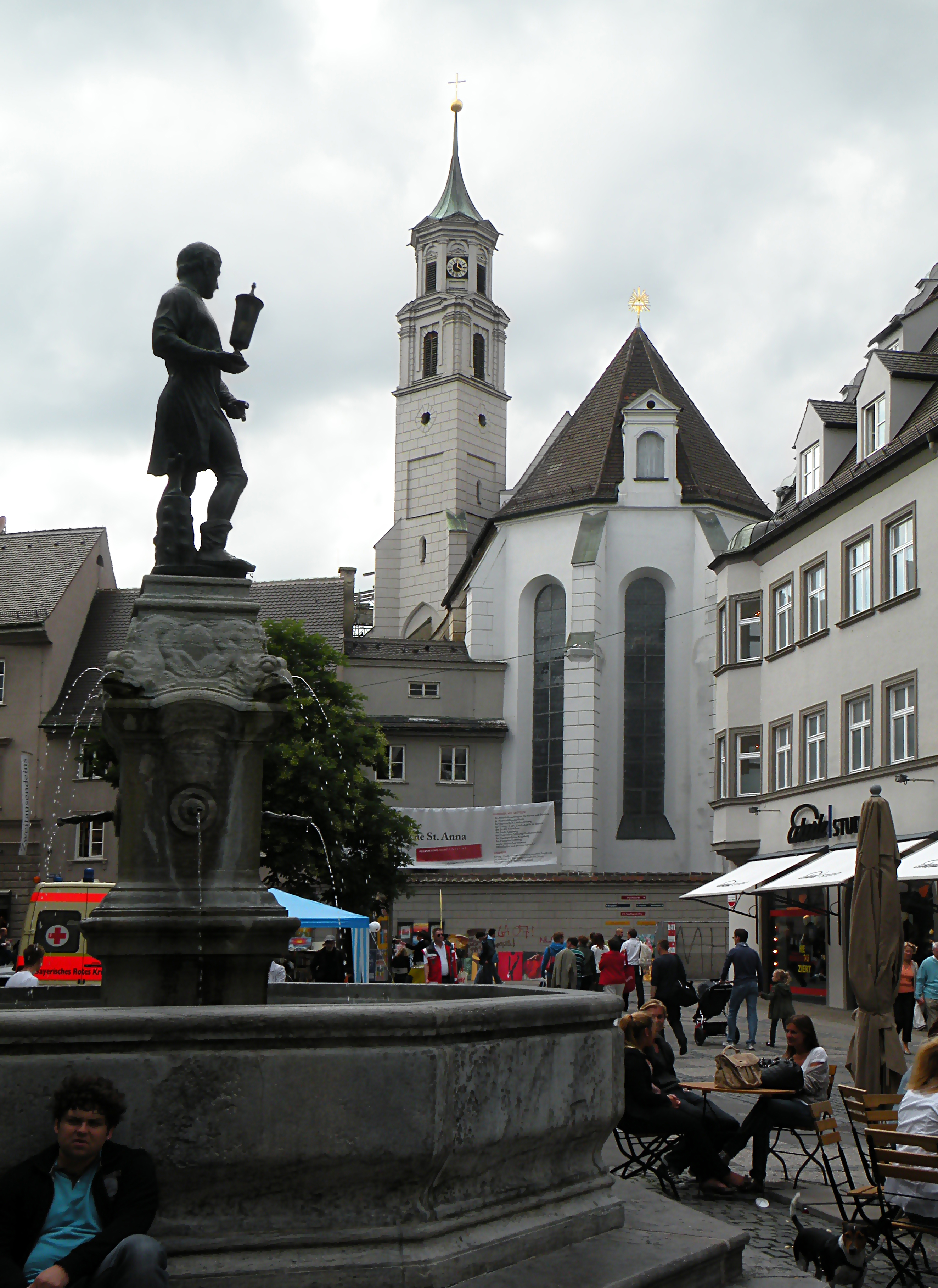 St.Anna Kirche Augsburg.